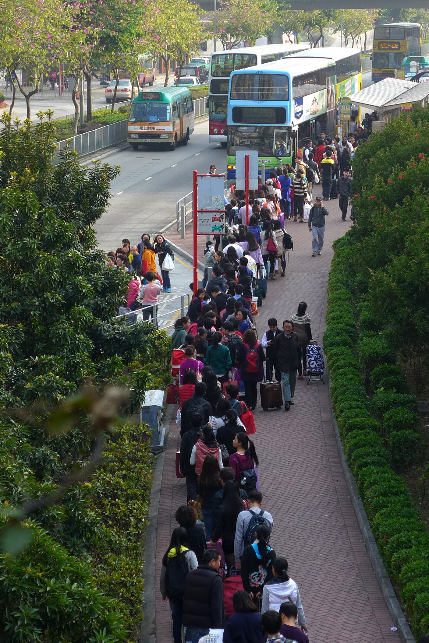 Tuen Mun Citybus B3X Queue